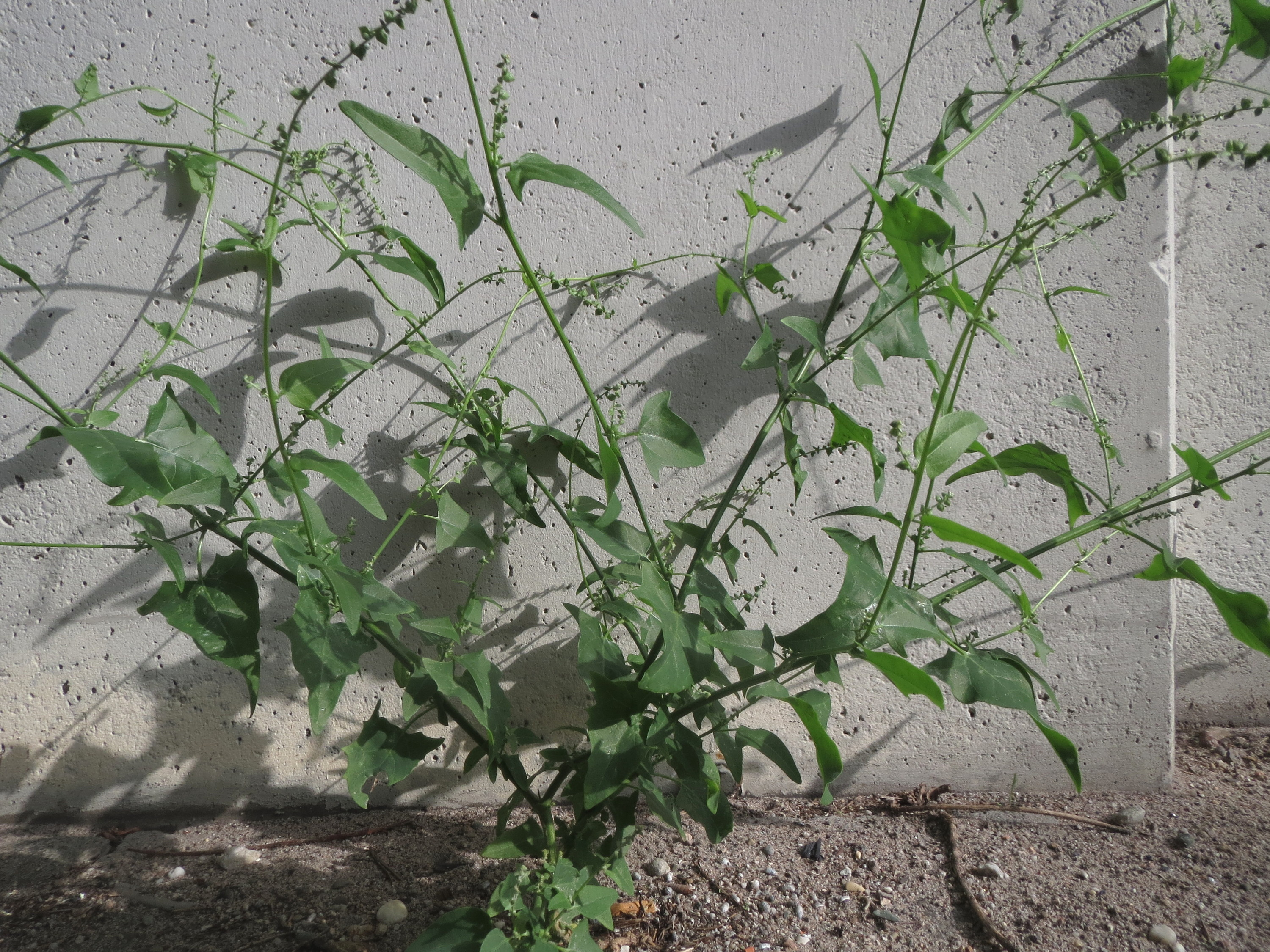 Glanz-Melde (Atriplex sagittata) an der A61 bei Hockenheim